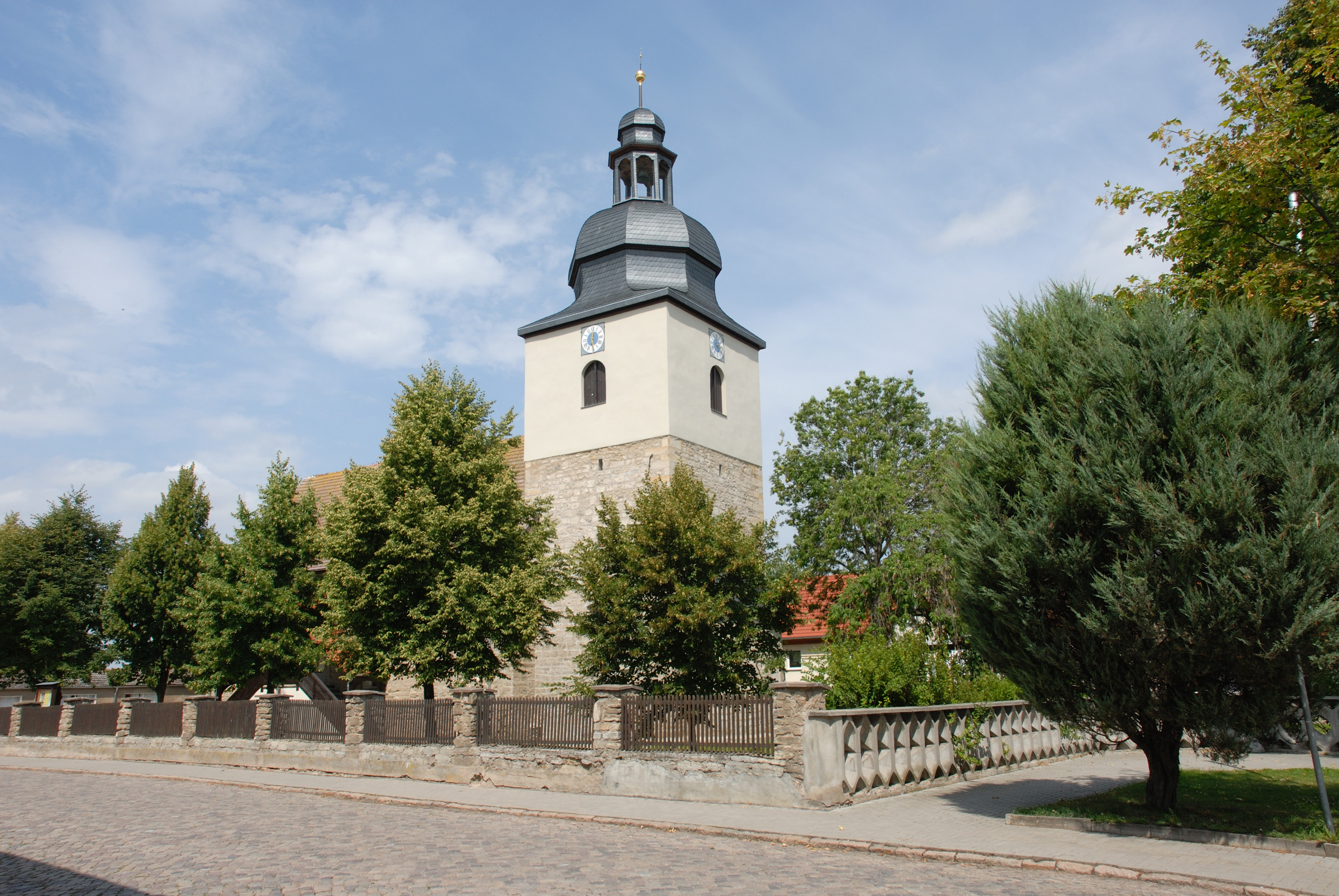 Andisleben ist Bachort. Von hier wanderte ein Zweig der Familie von Johann Sebastian Bach in die USA aus.